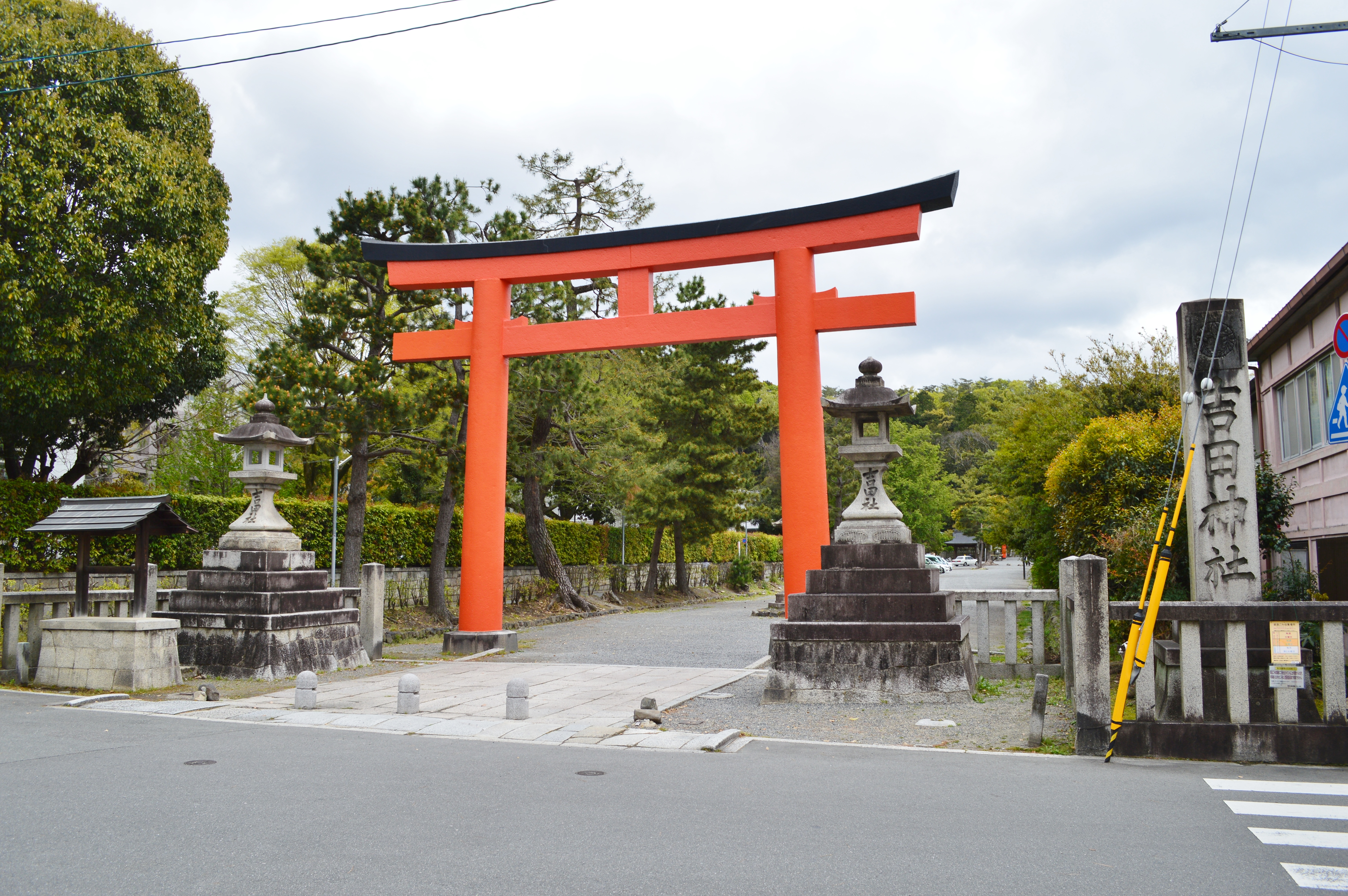 吉田神社 (京都市) 大鳥居 Nikon D3200